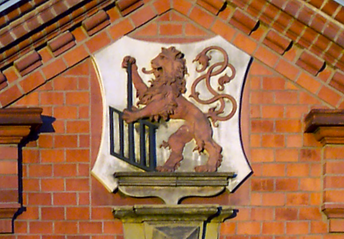 Wappen von W:de:Elberfeld/Wuppertal an der Grundschule Nützenberger Str. 242